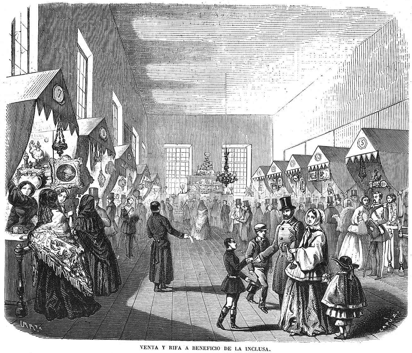 Venta y rifa a beneficio de la inclusa, en la revista española El Museo Universal.